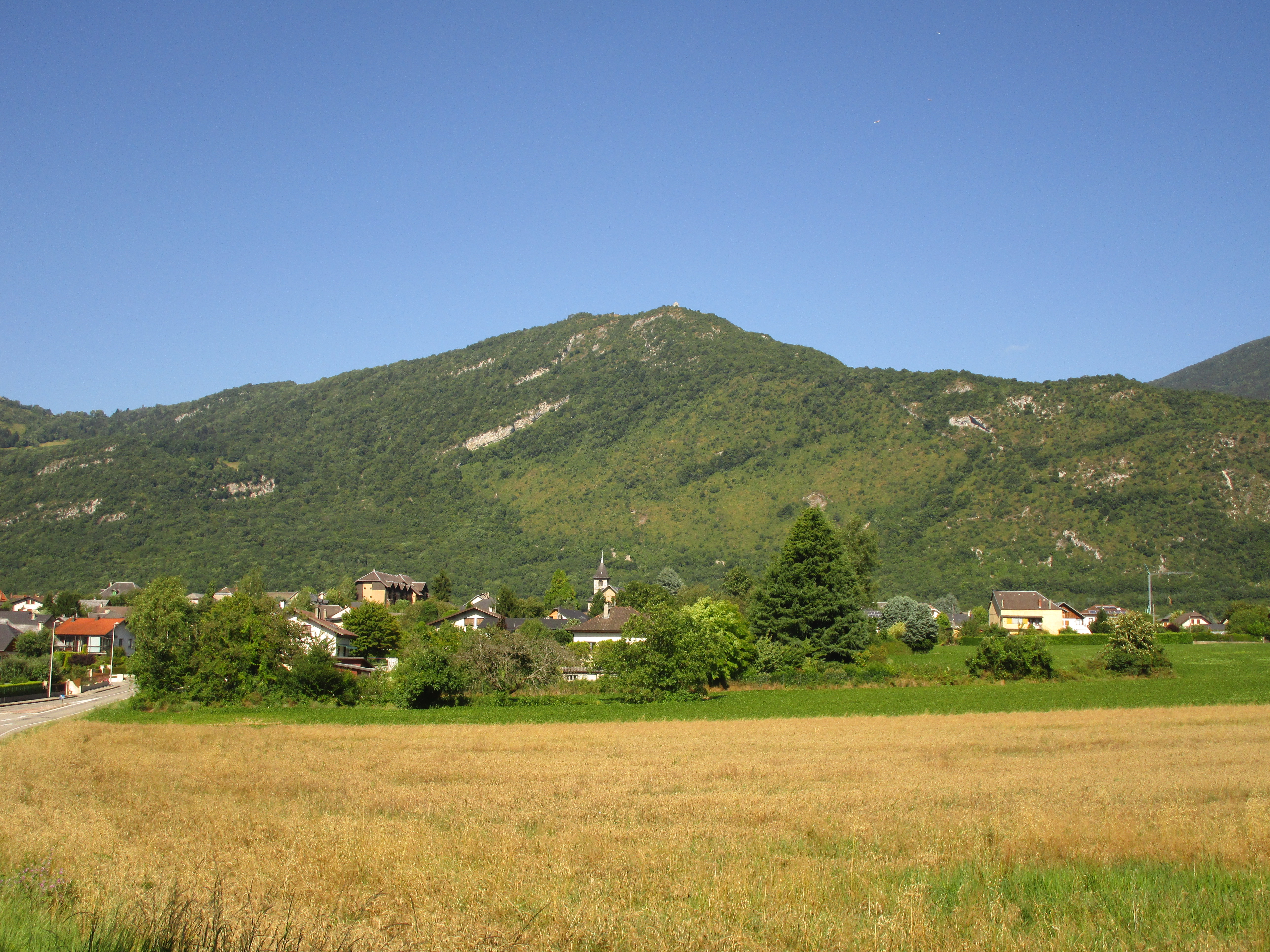 Le chef-lieu (Challes-les-Eaux, France) et le Mont Saint-Michel le 16 juillet 2016.